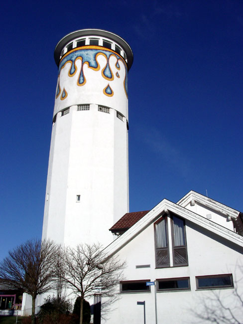 Lichtenwalder Wasserturm